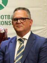 El Ayuntamiento de Madrid ha sido el escenario para la presentación del Campeonato del Mundo de Fútbol para personas ciegas, que se celebra por primera vez en Madrid y por segunda en España. Participarán por primera vez en esta competición, 16 selecciones nacionales, con el debut de México, Rusia, Mali, Costa Rica Tailandia e Irán, junto con las selecciones más experimentadas, Brasil, que ha vencido en cuatro ocasiones y Argentina, en otras dos, completando el cuadro de competición, las formaciones de España, Francia, Inglaterra, Turquía, Colombia, China, Corea del Sur y Marruecos.